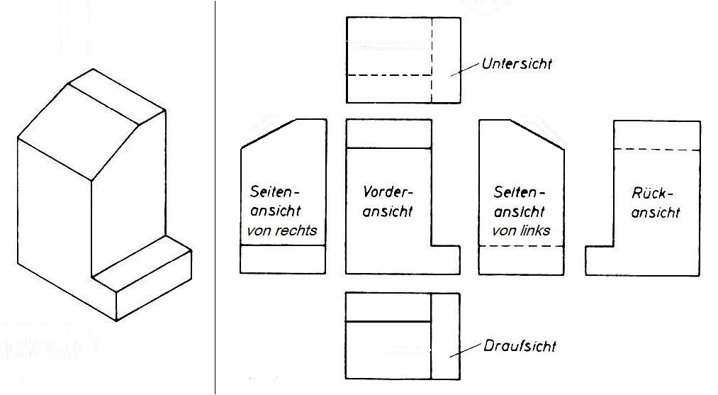 Technische Zeichnung: Ansichten-Schema